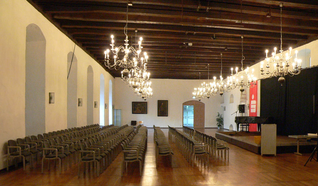 Welfenschloss Münden, 3. Etage, der „Rittersaal“